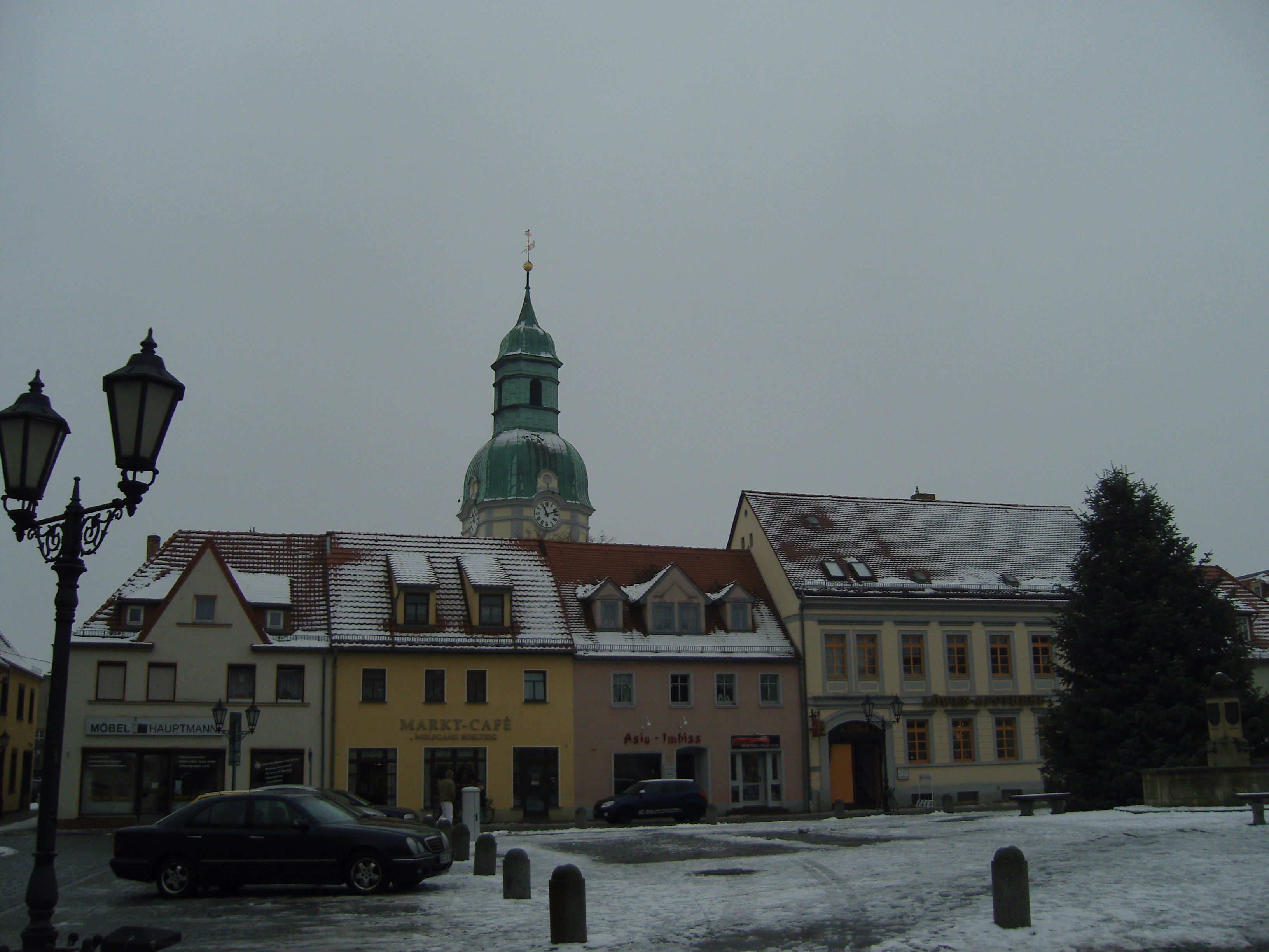 Denkmalgeschützter Marktplatz in Ruhland, Nordwestansicht von der Fischerstraße; links hinten in die Kirchgasse, rechts Marktbrunnen und (noch ungeschmückt) der Weihnachtsbaum